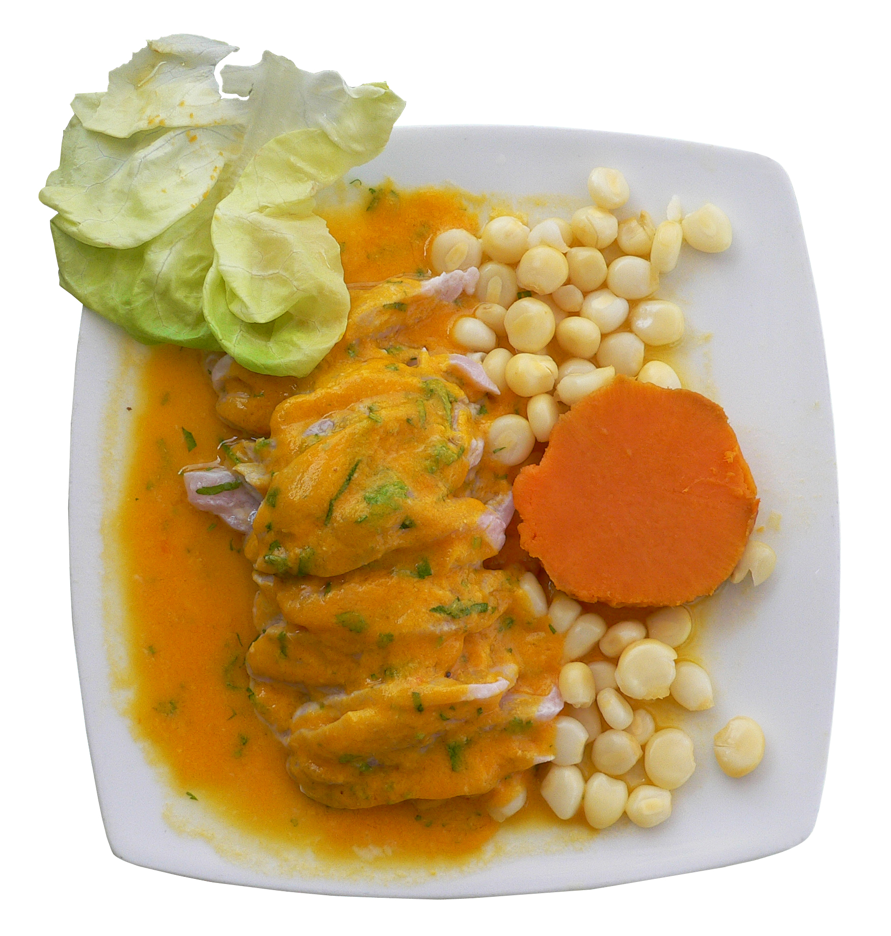 Tiradito, plato de la gastronomía del Perú. Foto de Manuel González Olaechea y Franco ©